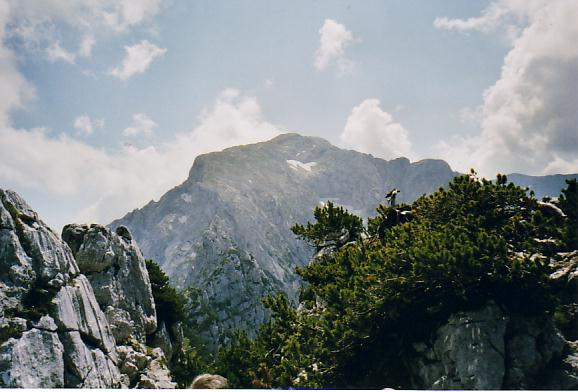 Hoher Göll im Berchtesgadener Land